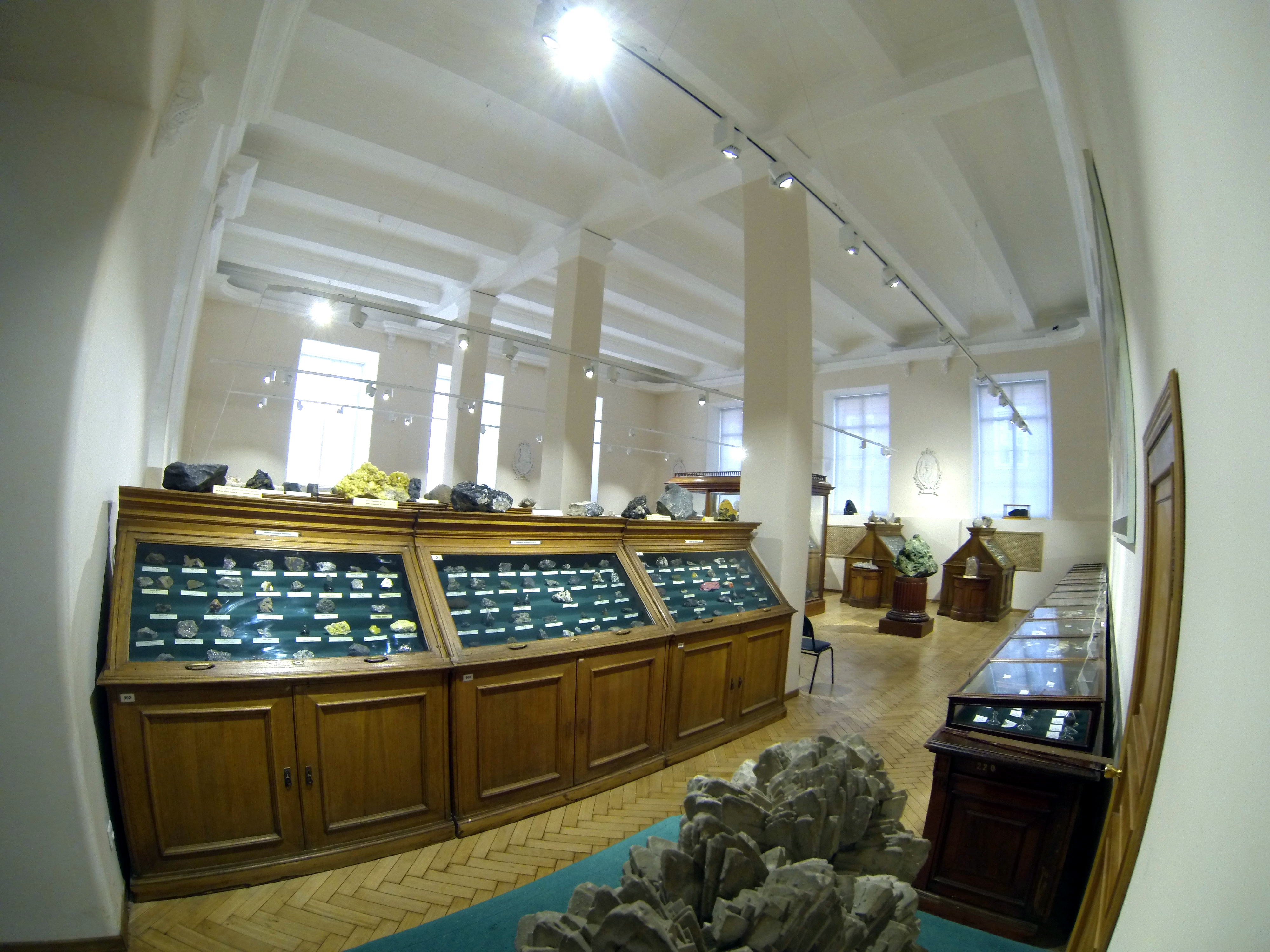 Государственный геологический музей имени В. И. Вернадского РАН, минералогический зал.